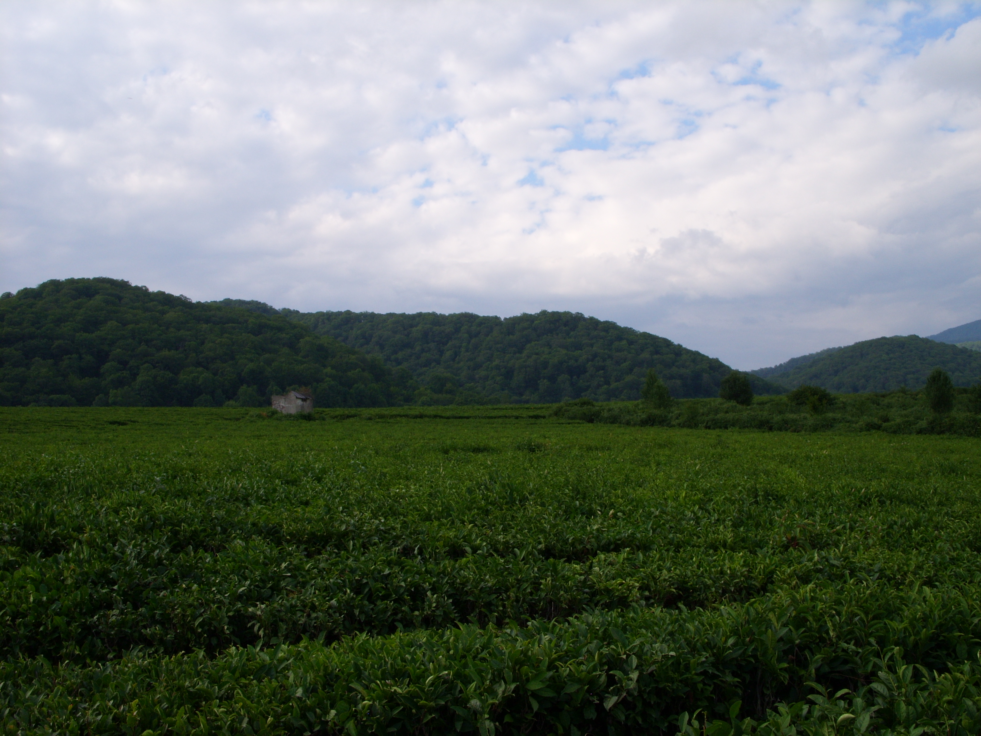 Снимок июля 2009 г. Если не ошибаюсь, сделан в ауле Ахинтам, Кичмайский сельский округ, Лазаревский район Сочи